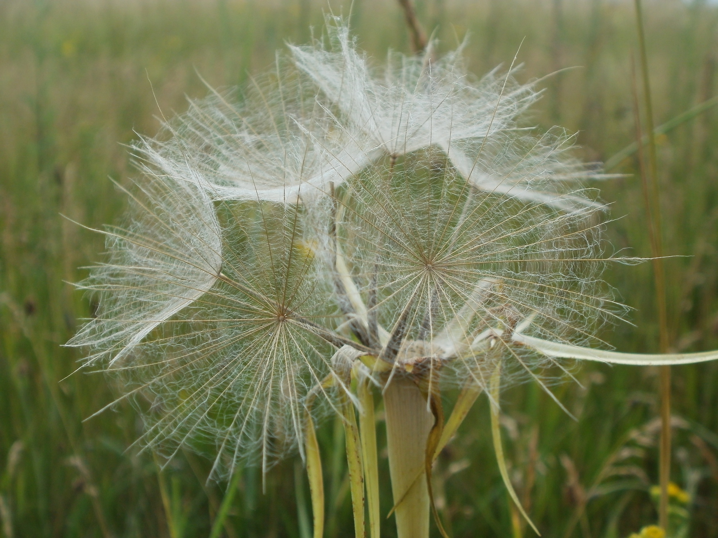 Großer Bocksbart (Tragopogon dubius) im Hockenheimer Rheinbogen